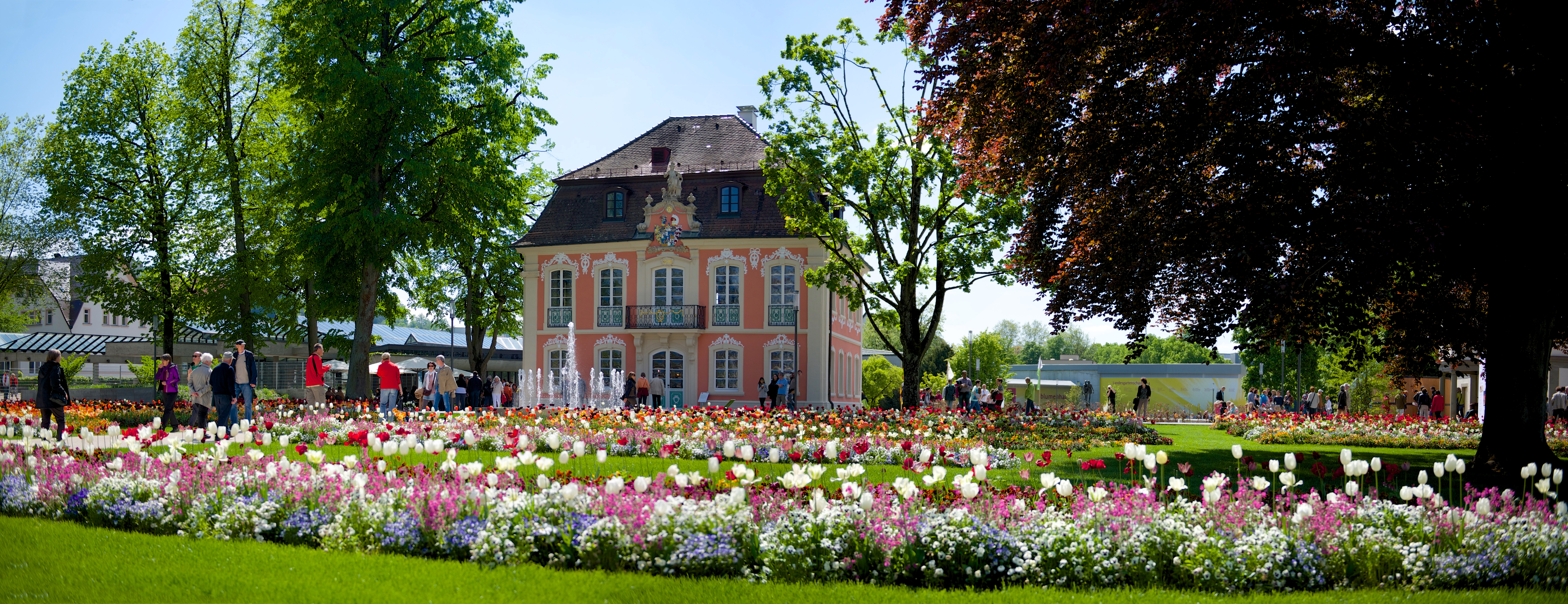 Rokokoschlößle und Stadtgarten zur Landesgartenschau Schwäbisch Gmünd